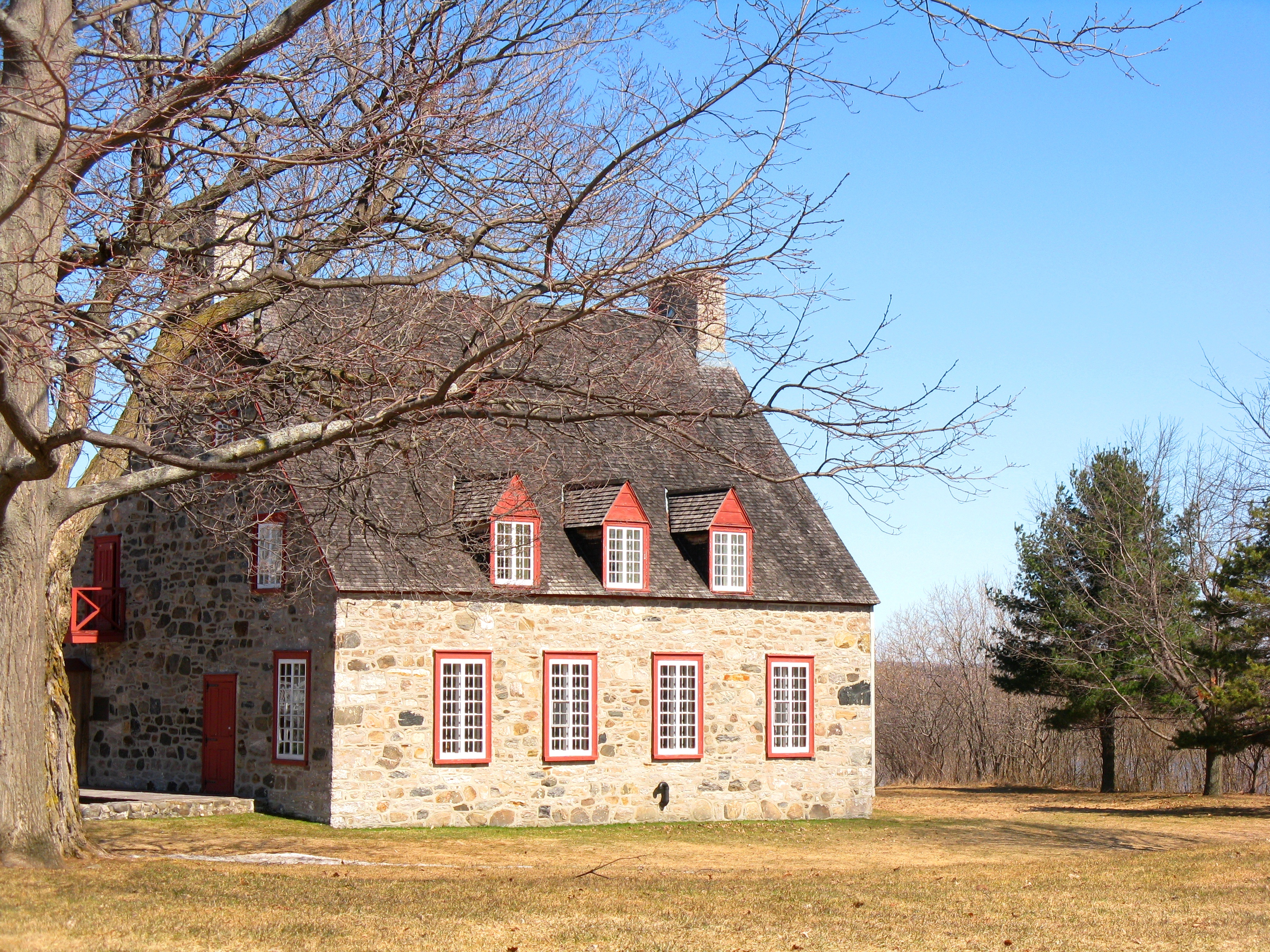 Vieux presbitaire de Deschambault, 106, Rue Saint-Joseph, Deschambault-Grondines, Canada